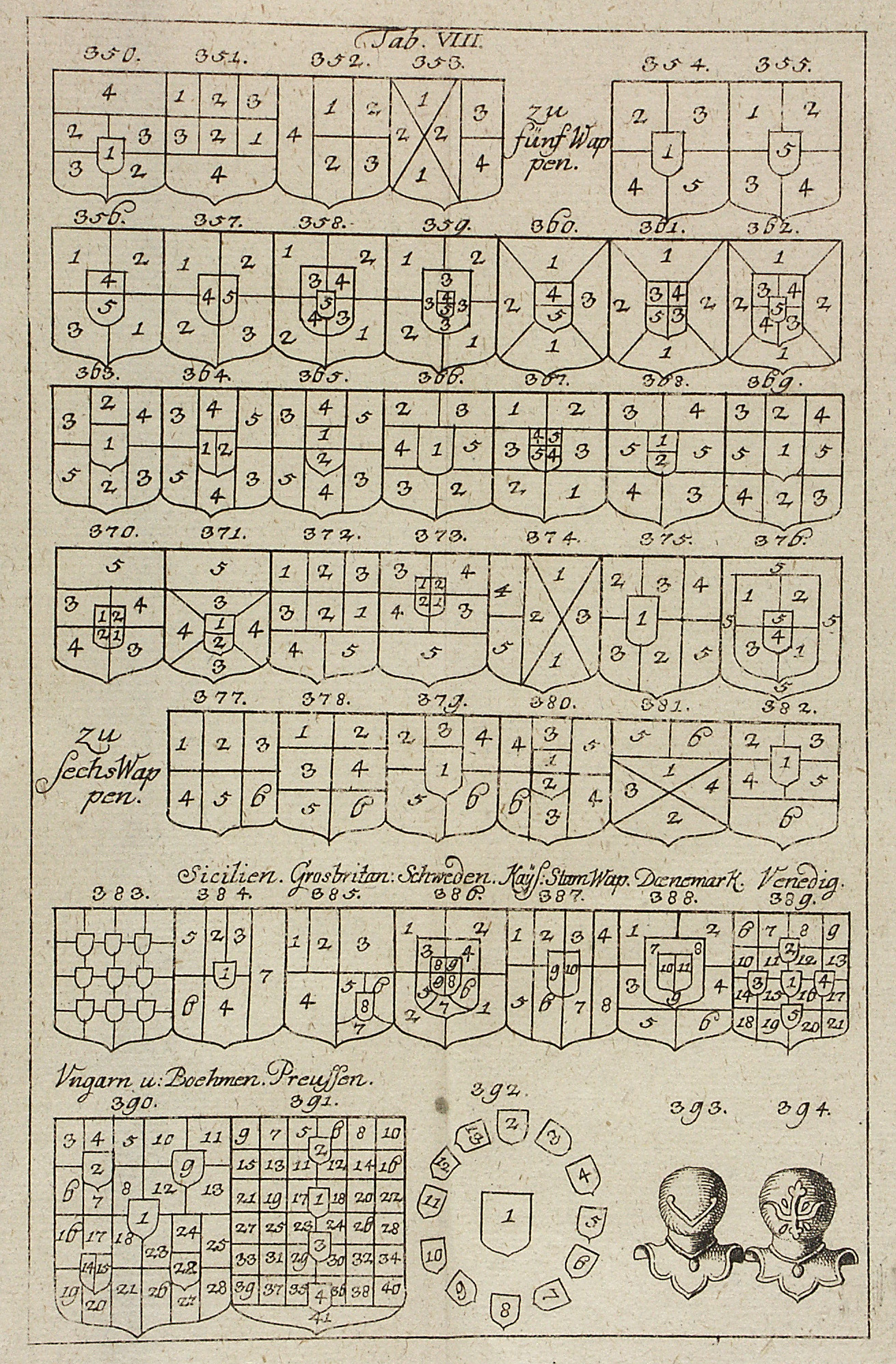 A címerlerás sorrendje.